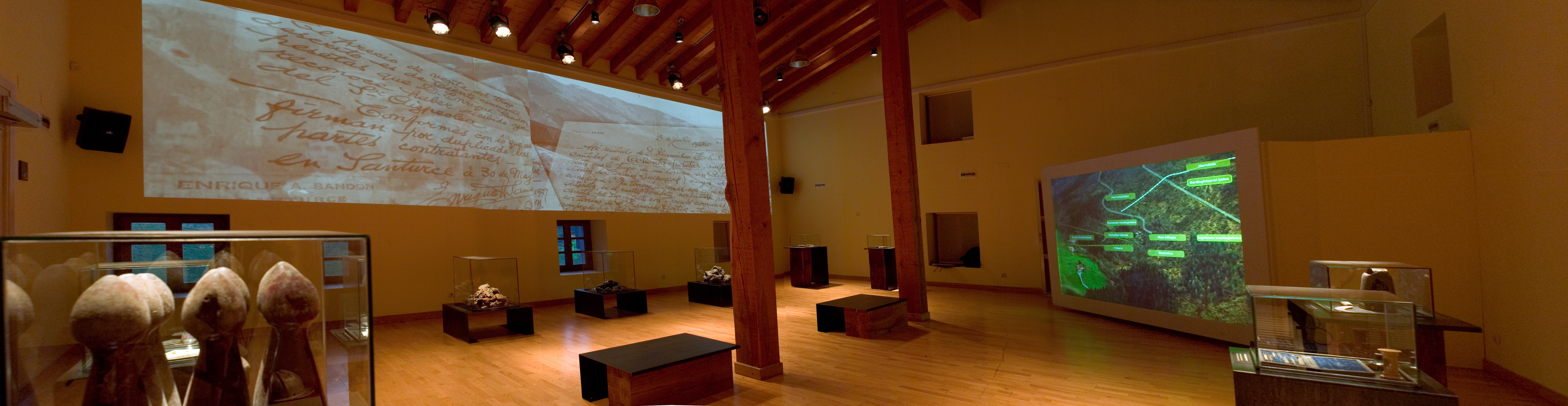 Berritzailea eta interaktiboa den Aizpeako meategien Interpretazio Zentro edo Adieraztegia.